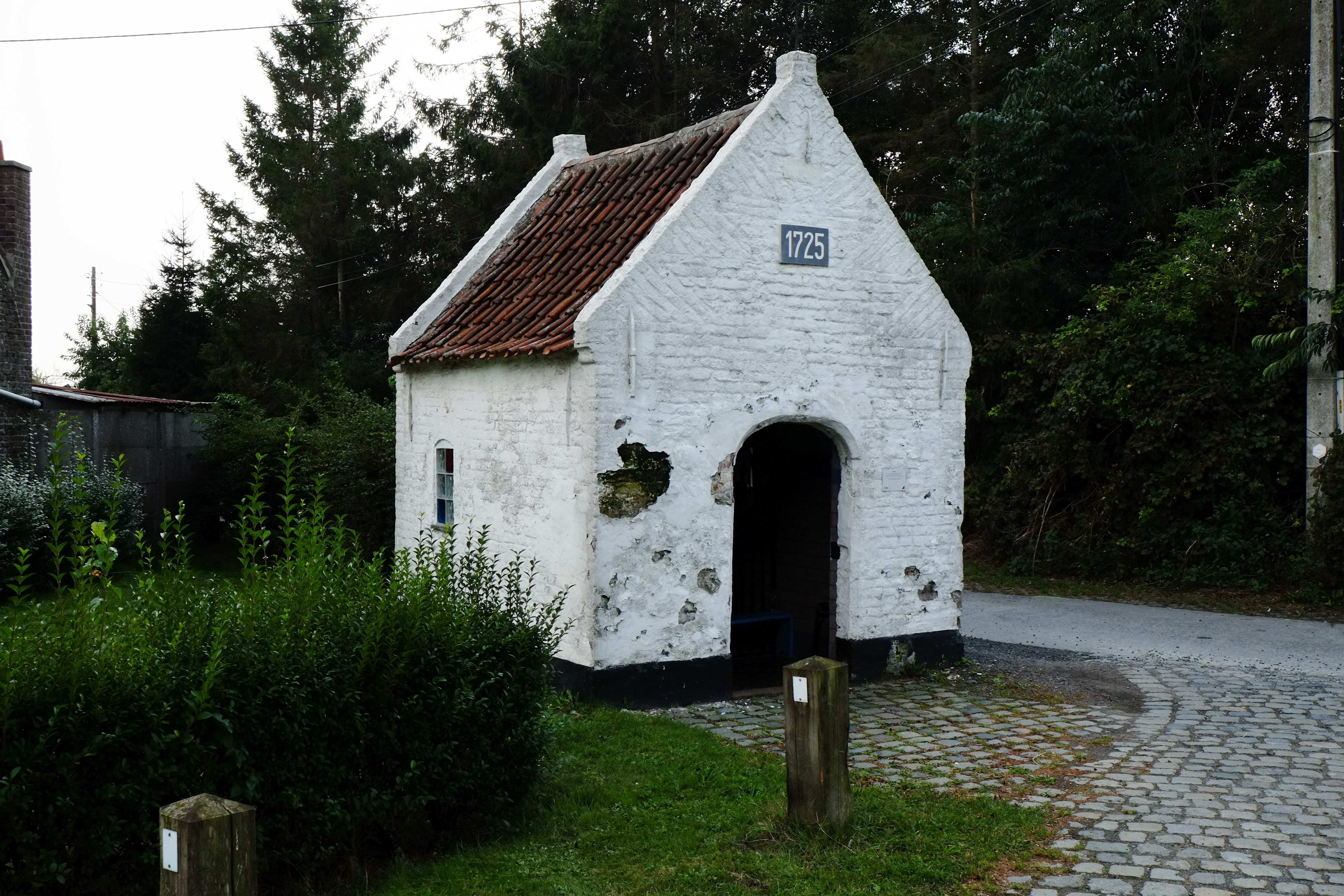 Vedastusstraat z.nr./ Bedevaartstraat (bij nr. 14). Unieke 18de-eeuwse wegkapel "Onze-Lieve-Vrouw van Goede Bijstand", een gevelsteen in de geveltop is voorzien van het jaartal "1725". Witgekalkte baksteenbouw met gepekte plint, voor- en achtertuitgevels gekenmerkt door schouderstukken, aandaken en muurvlechtingen. Kapel afgedekt door pannen zadeldak (nok haaks op de weg, Vlaamse pannen). In de voorgevel zit een korfbogige deuropening met afgevlakte rand, voorzien van de authentieke rechthoekige, opgeklampte deur. De deur heeft een vierkant venstertje met roedeverdeling en een ijzeren offerblok. Segmentboogvensters met afzaat in de zijgevels. Blinde achtergevel. Interieur. Gestuct tongewelf op keellijst en gestucte wanden met tegellambrisering. Eind-19de- of begin-20ste-eeuwse cement-tegelvloer, gemarmerd altaar achter een smeedijzeren hek. Op het altaar, beelden van Maria met kind en de Heilige Theresia, bustes van Maria en het Heilig Hart. Het oorspronkelijke Mariabeeld wordt tegenwoordig in de pastorie bewaard.